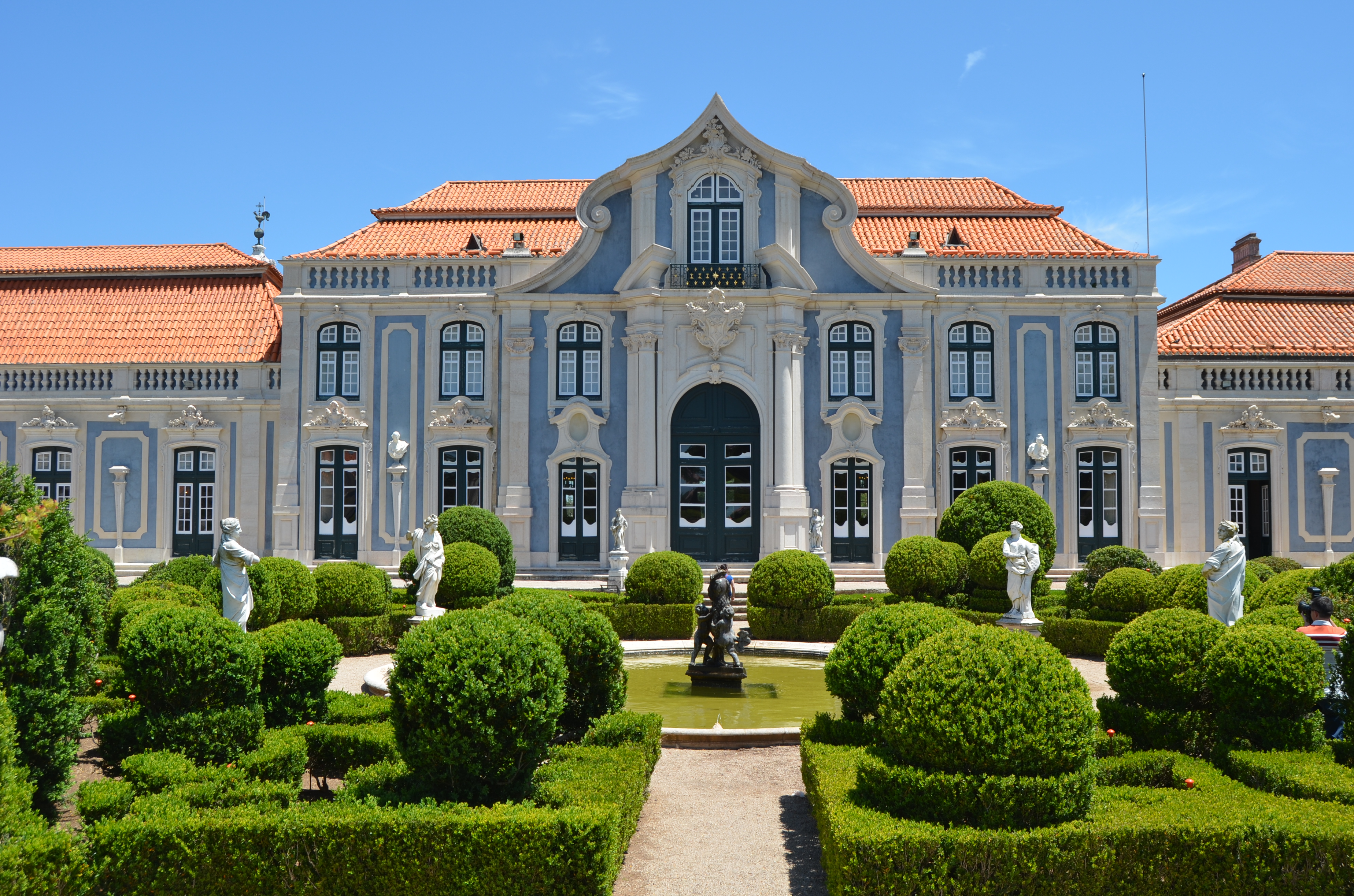 Oh happy days!